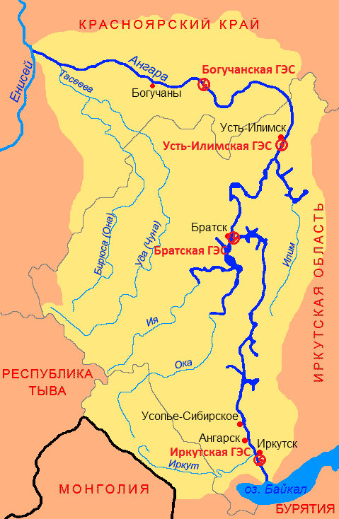 Ангарский каскад ГЭС